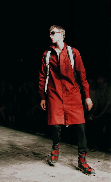 enviada por mi amigo huxon desde parís